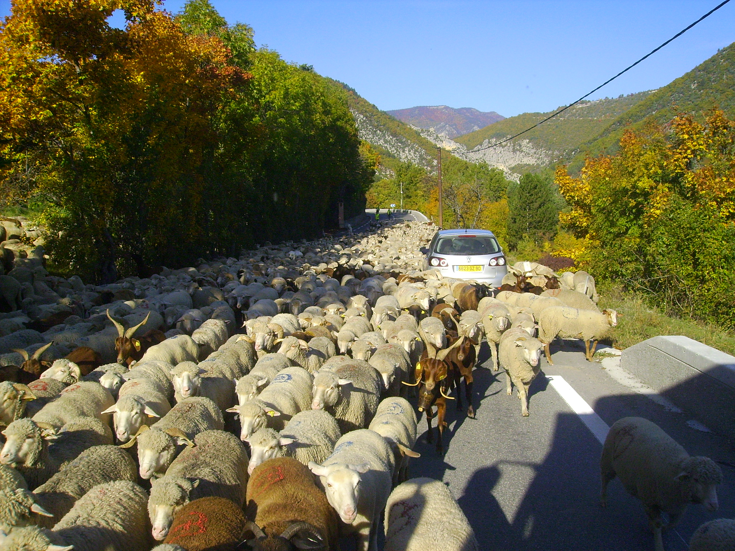 Moutons sur la route entre Entrevaux et Annot